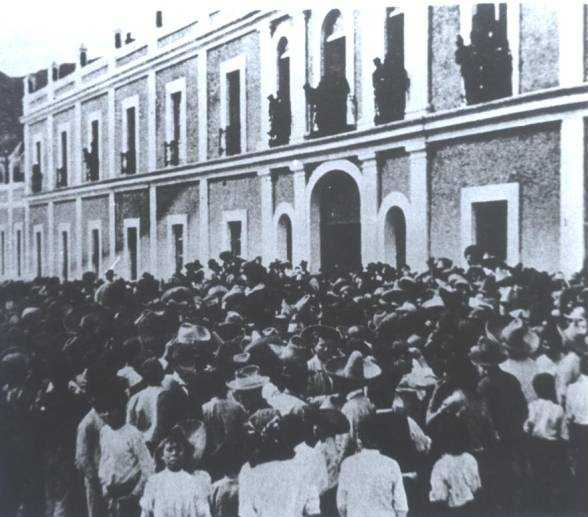 Obreros amotinados protestan frente a la puerta principal de la Fábrica de Hilos de Río Blanco, Veracruz, México, durante los sucesos de la Huelga de Río Blanco el 7 de enero de 1907.